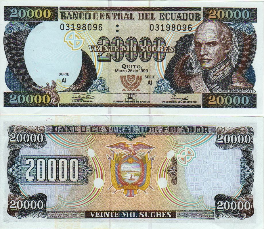 Ecuadorian 20000 Sucres bill